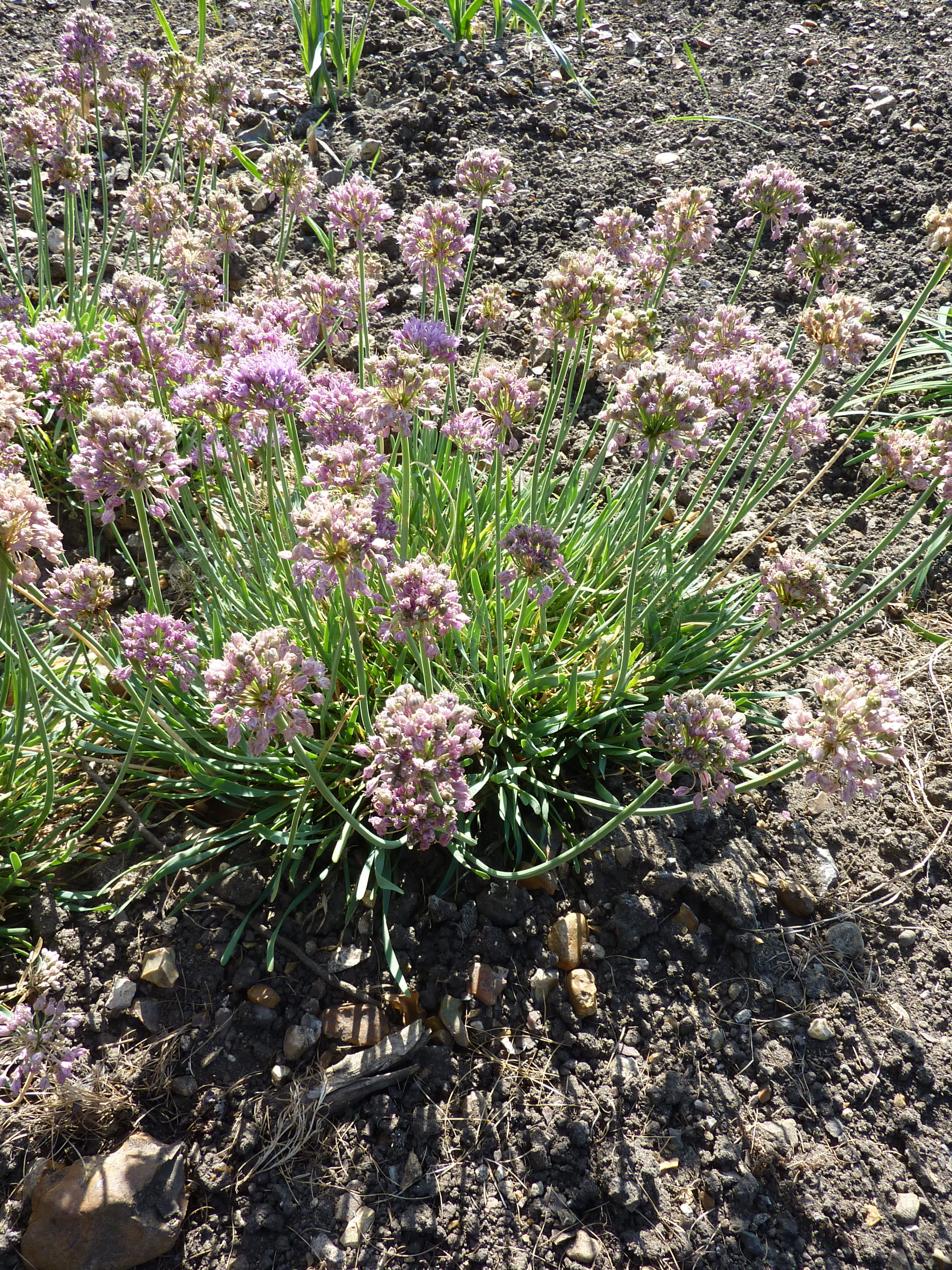 Allium senescens